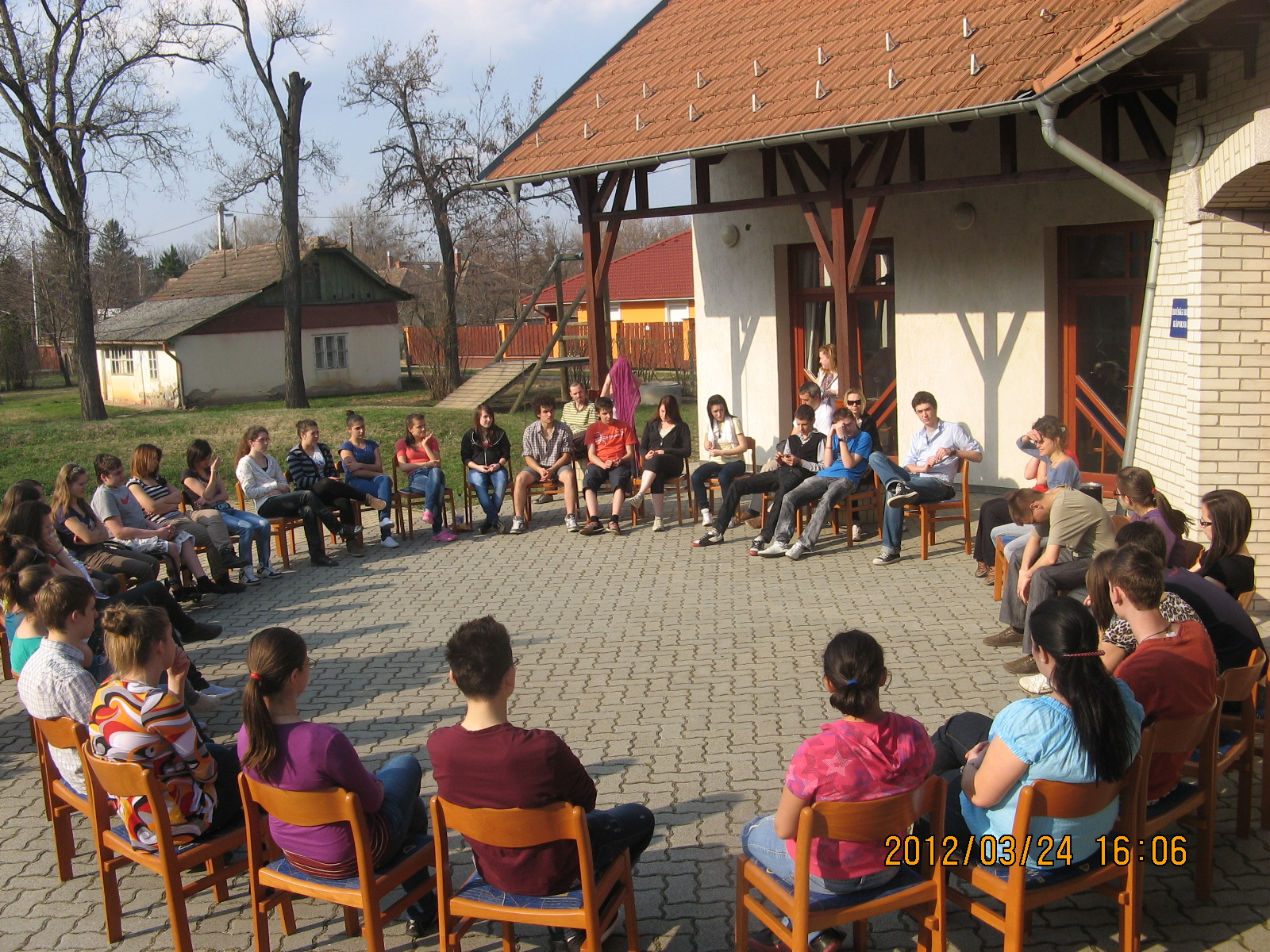 Munka nagycsoportban.